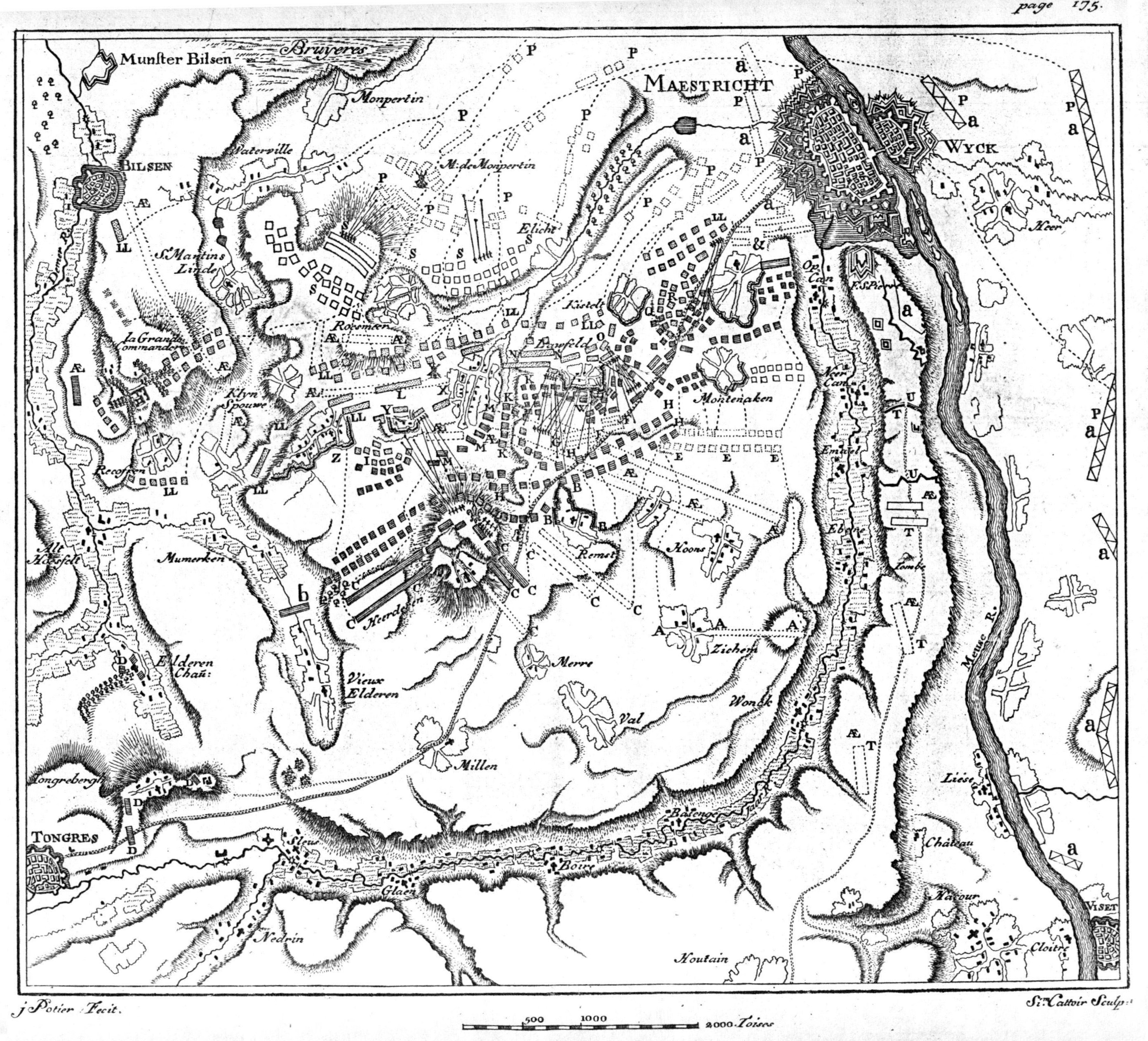 Mapa de la batalla de Lawfeldt